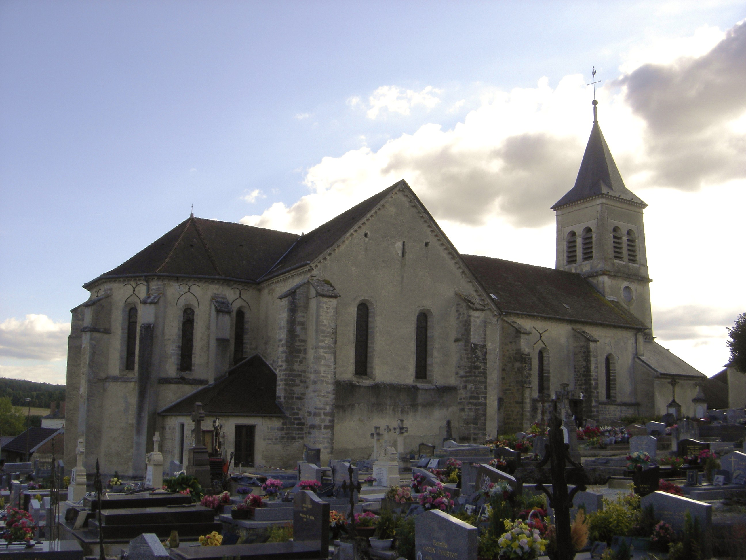 Église de Vitry-le-Croisé - Aube - France